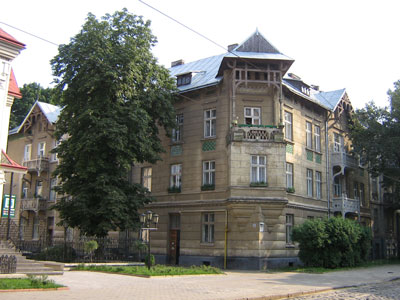 Житловий будинок у Львові (вул. Чупринки, 11-а). архітектор Іван Левинський